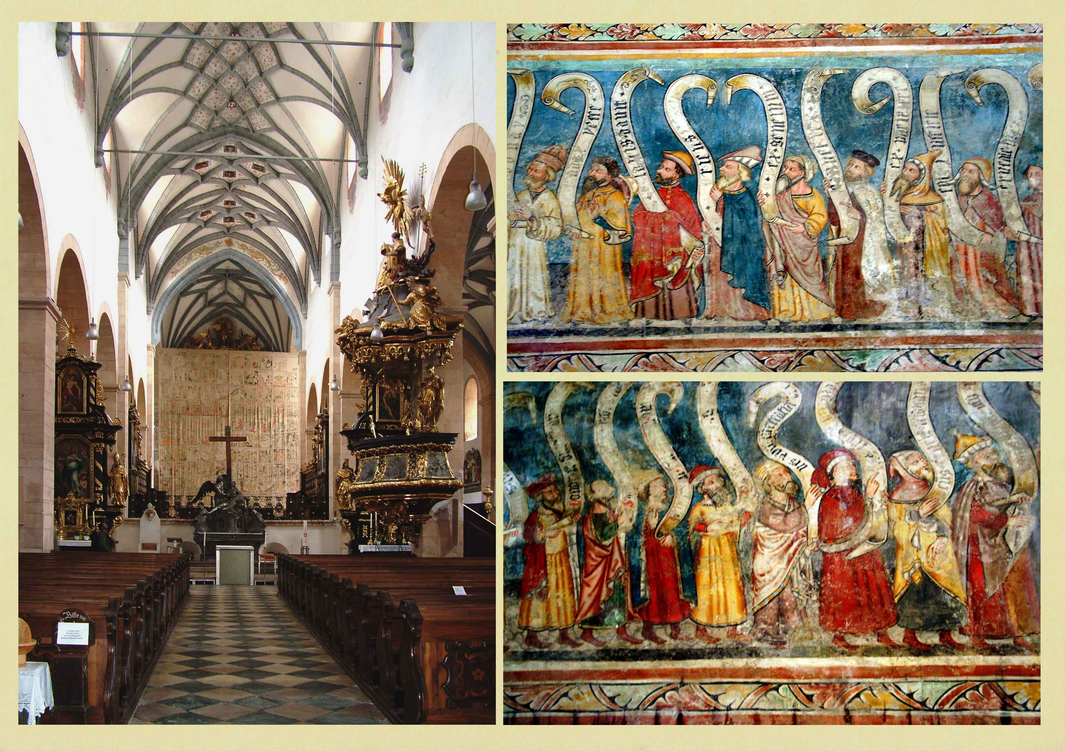 Gurki székesegyház (Ausztria): a főhajó a híres Böjti Lepellel, valamint falfestmény-részletek a belső déli falszakaszokról